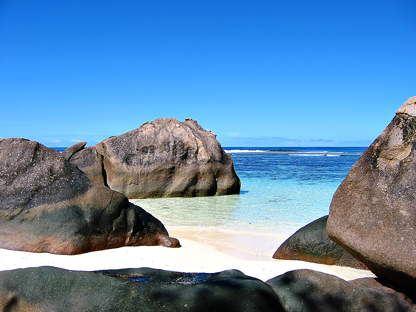 Baie Lazare - Seychelles (Mahé) On Black